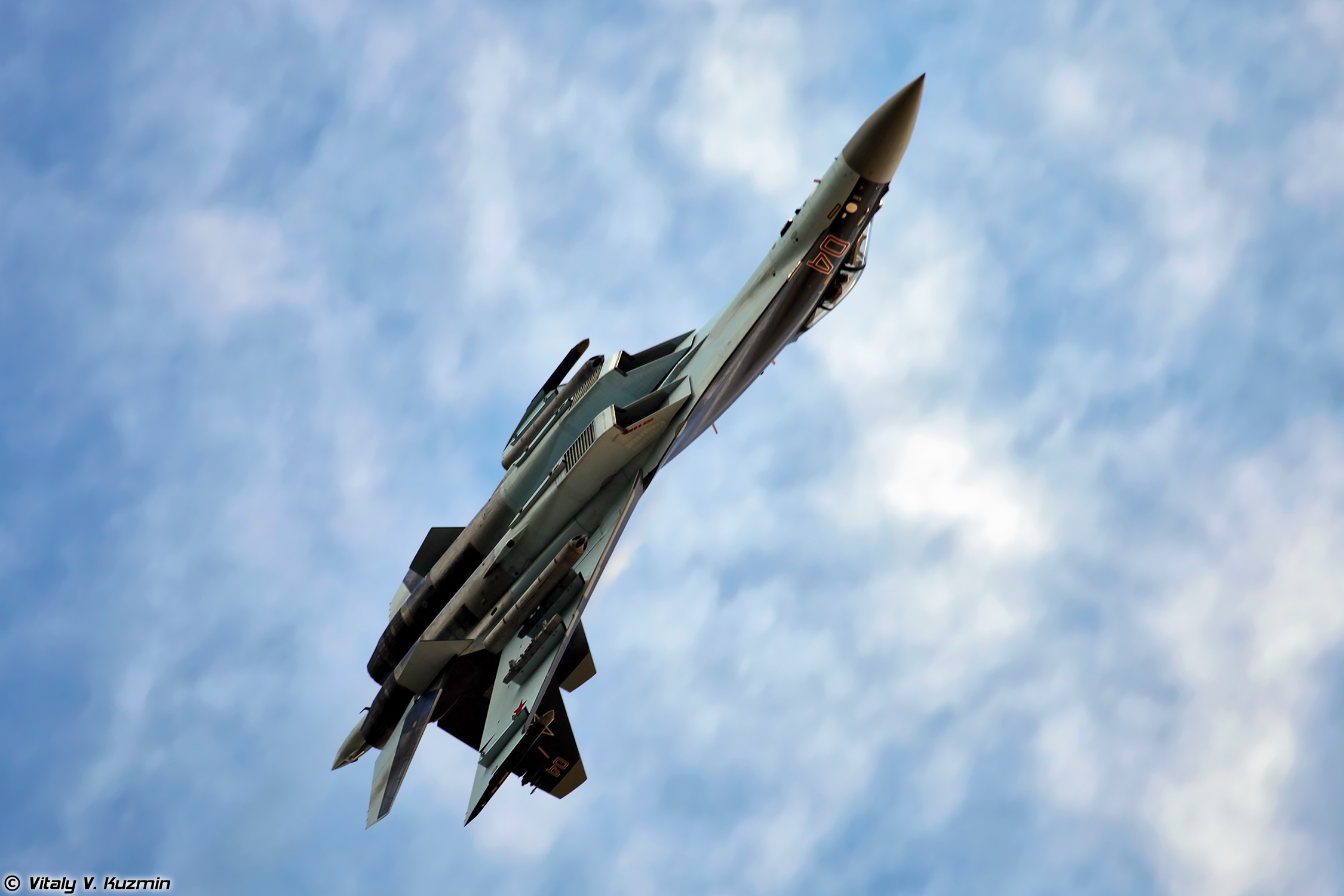 Aviamix 2015